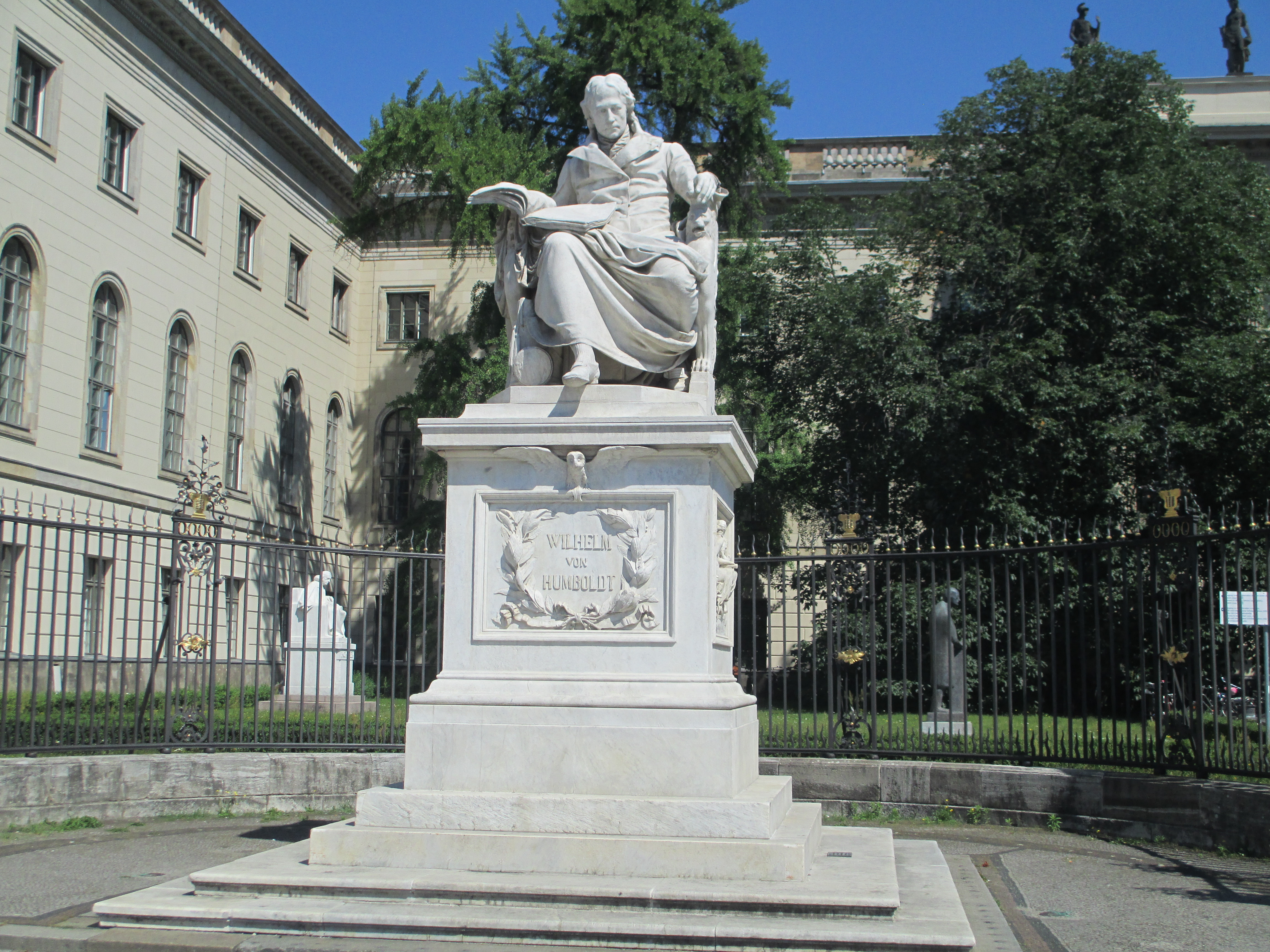 פסל של וילהלם פון הומבולדט בברלין